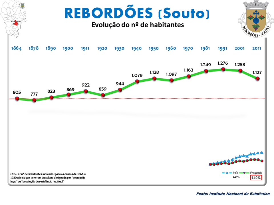 Cenos 1864/2011